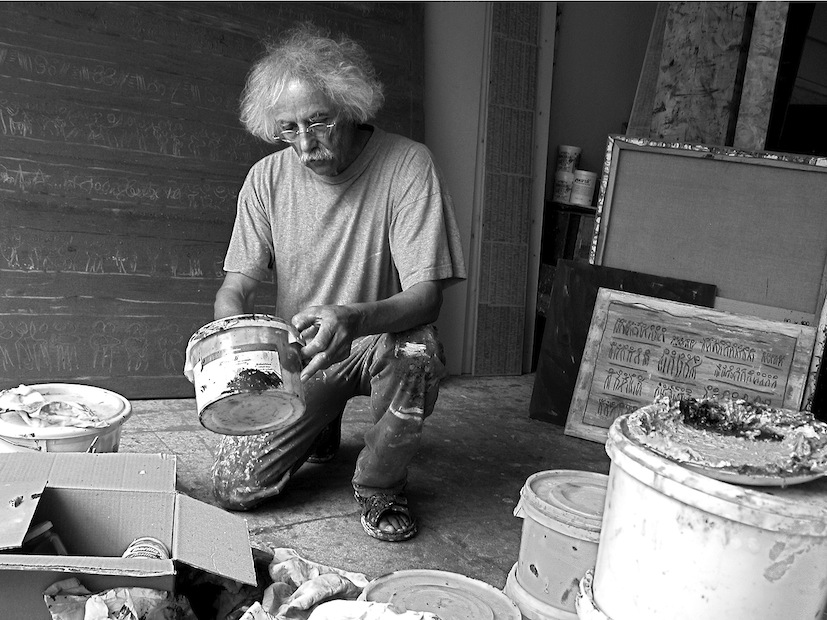 Der Künstler im Alter von 67 Jahren in seinem Atelier in Steinen SZ.